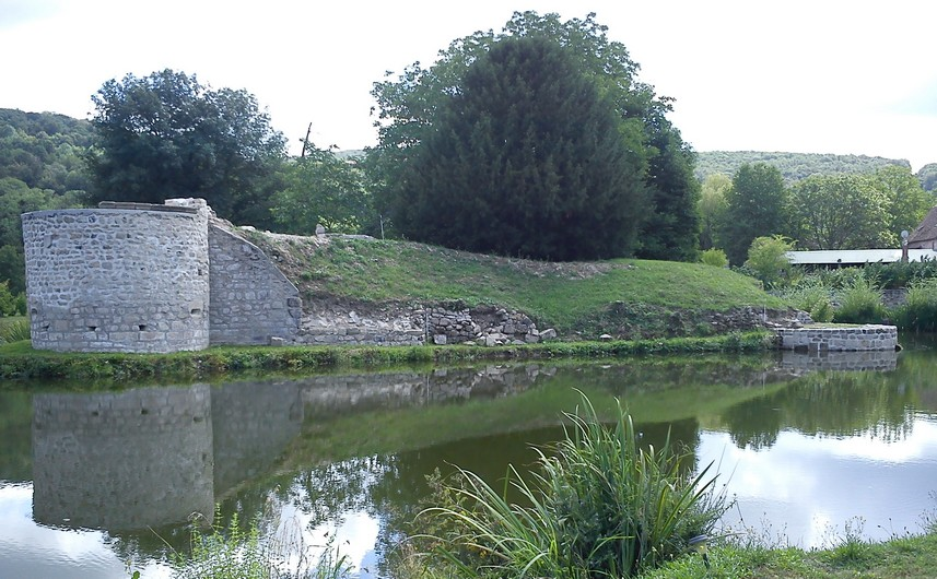 château situé à La Chapelle-sous-Uché